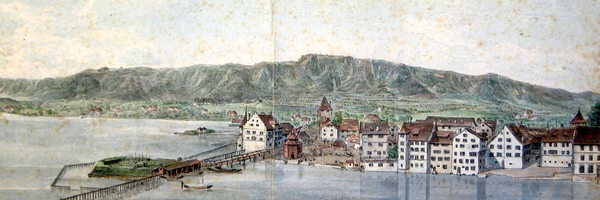 Kratzquartier in Zürich, Darstellung von Heinrich Keller (?) vor 1540 vor der Aufschüttung. Am linken Bildrand ist das Bauschänzli zu erkennen.